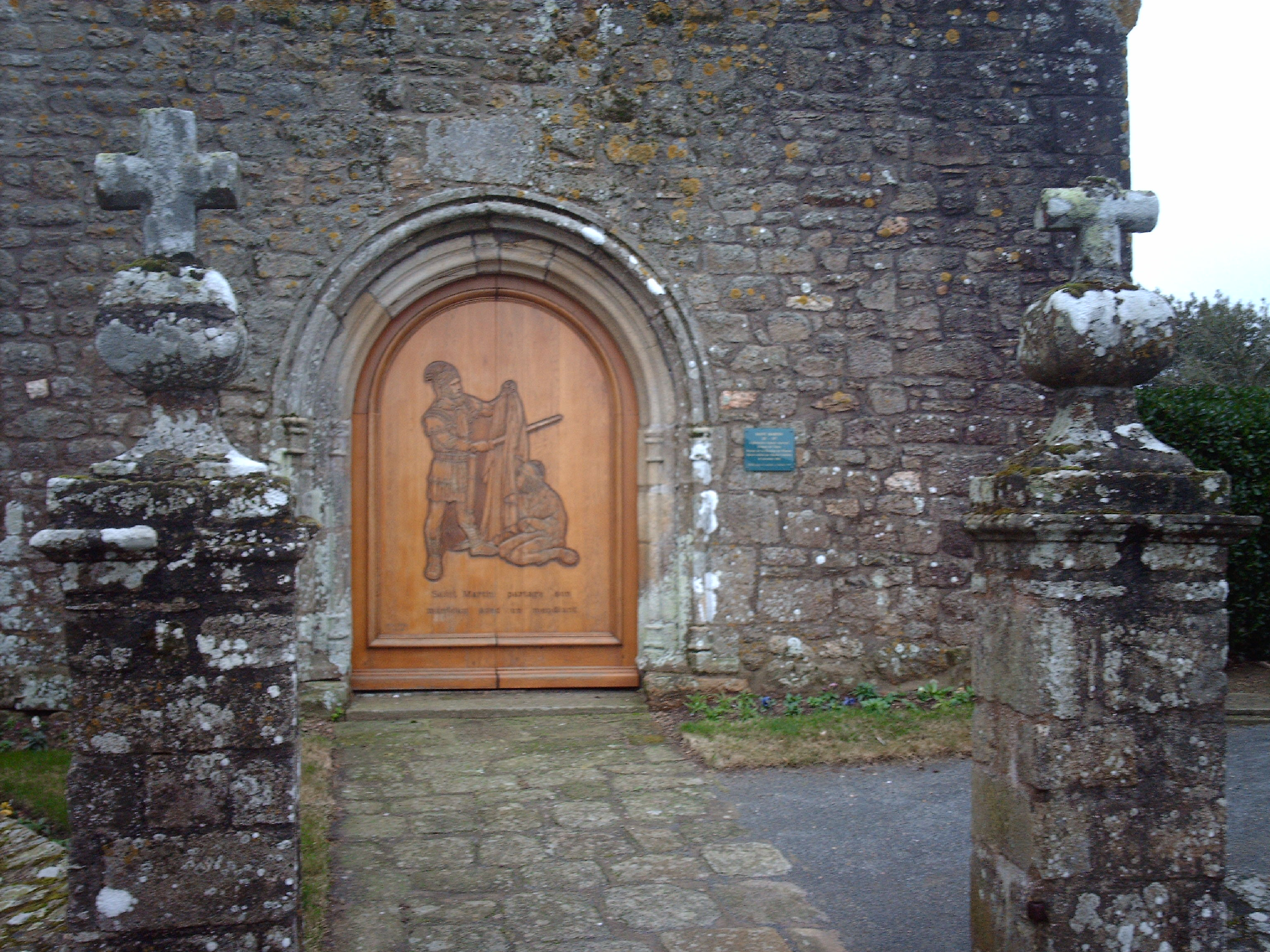 La porte St martin Ploeren(56)